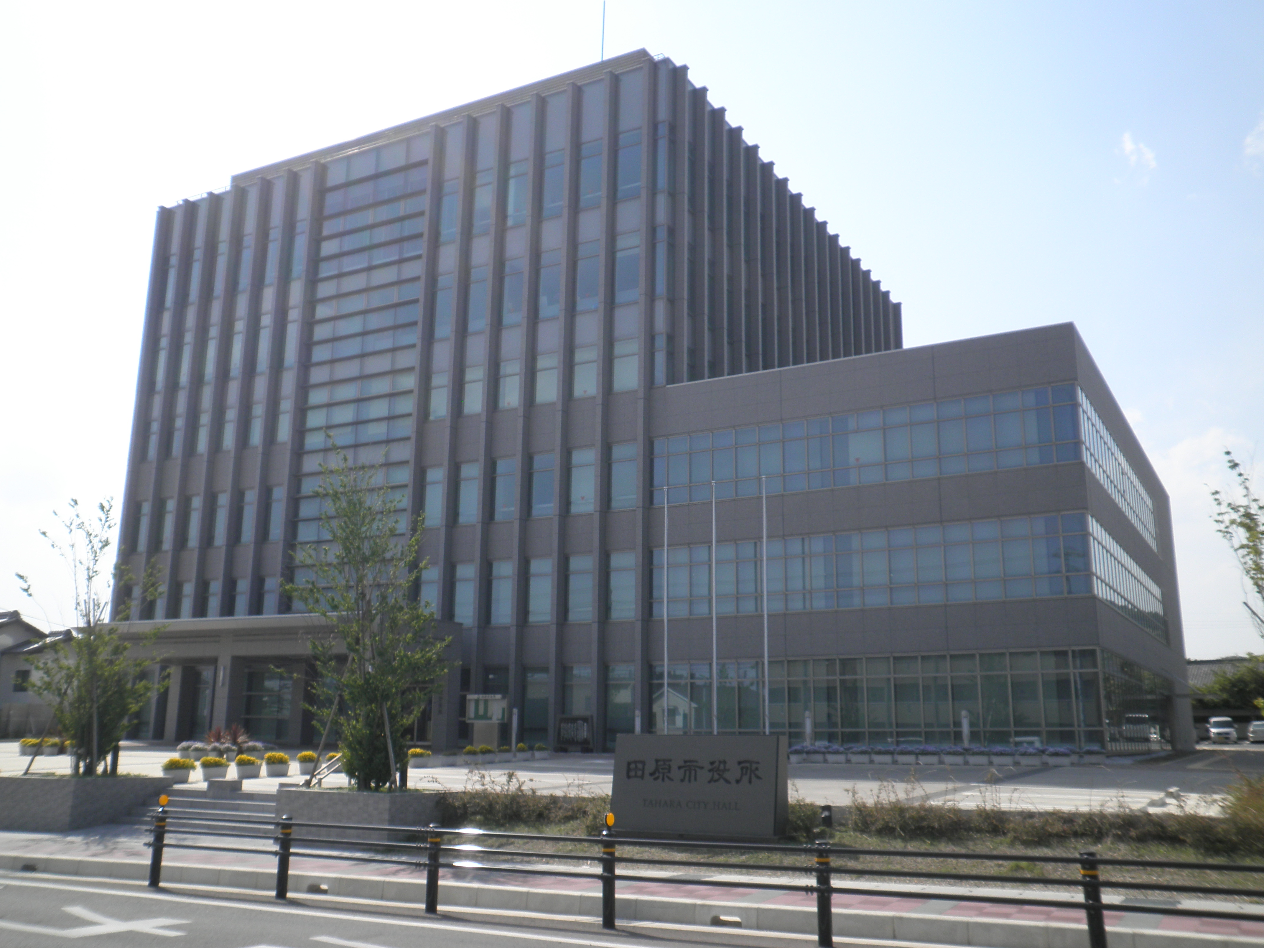 愛知県田原市の田原市役所南庁舎